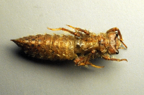 Cordulegaster bidentata larva/nymph exuvium